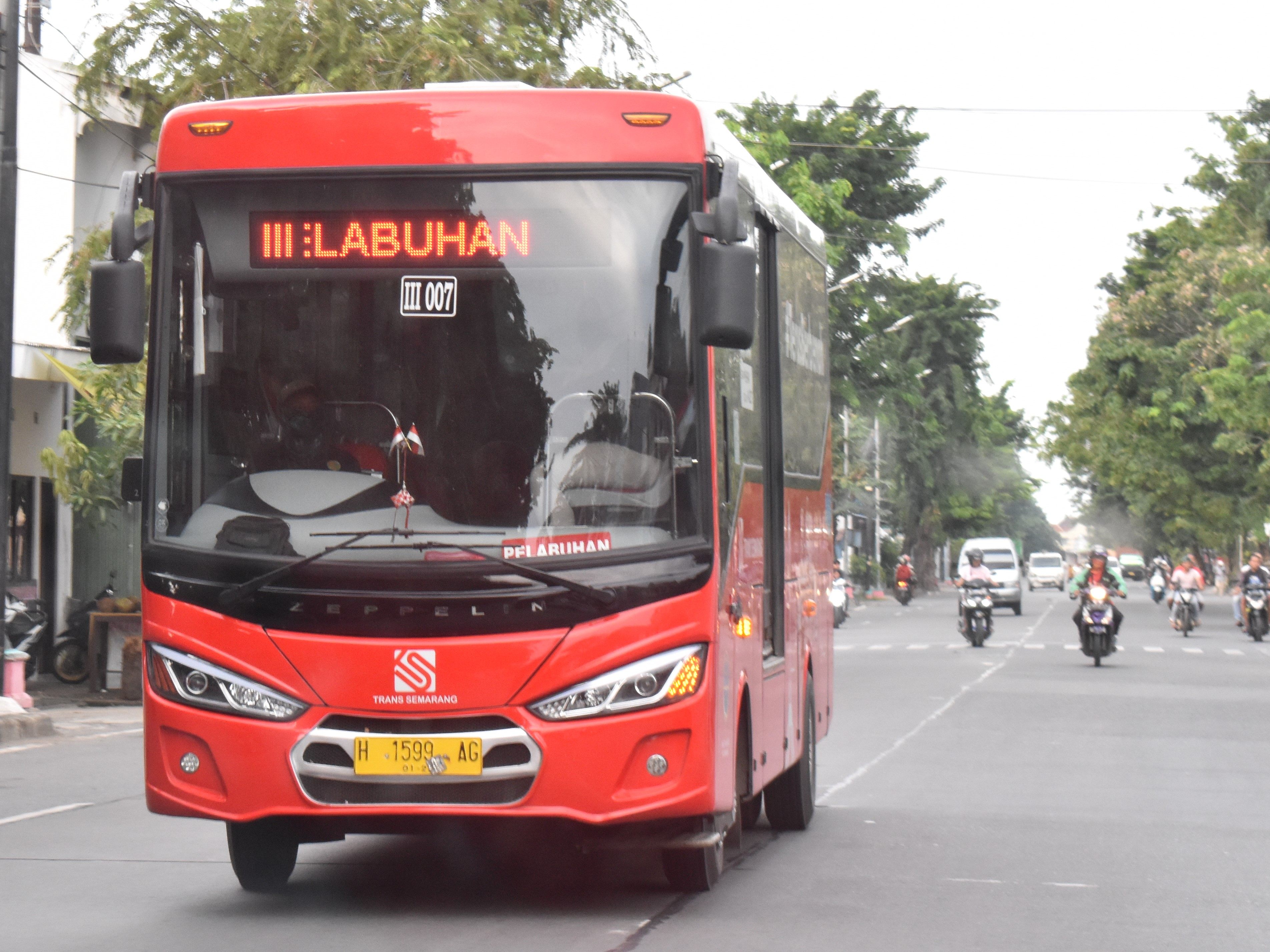 Koridor 3 - Zeppelin M5 Trans Semarang Operated by PT Mekar Flamboyan Sendang Mulyo Jaya